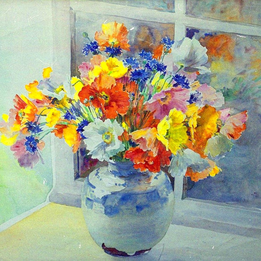 Thérèse Lemoine-Lagron Bouquet vase blanc-bleu 1940